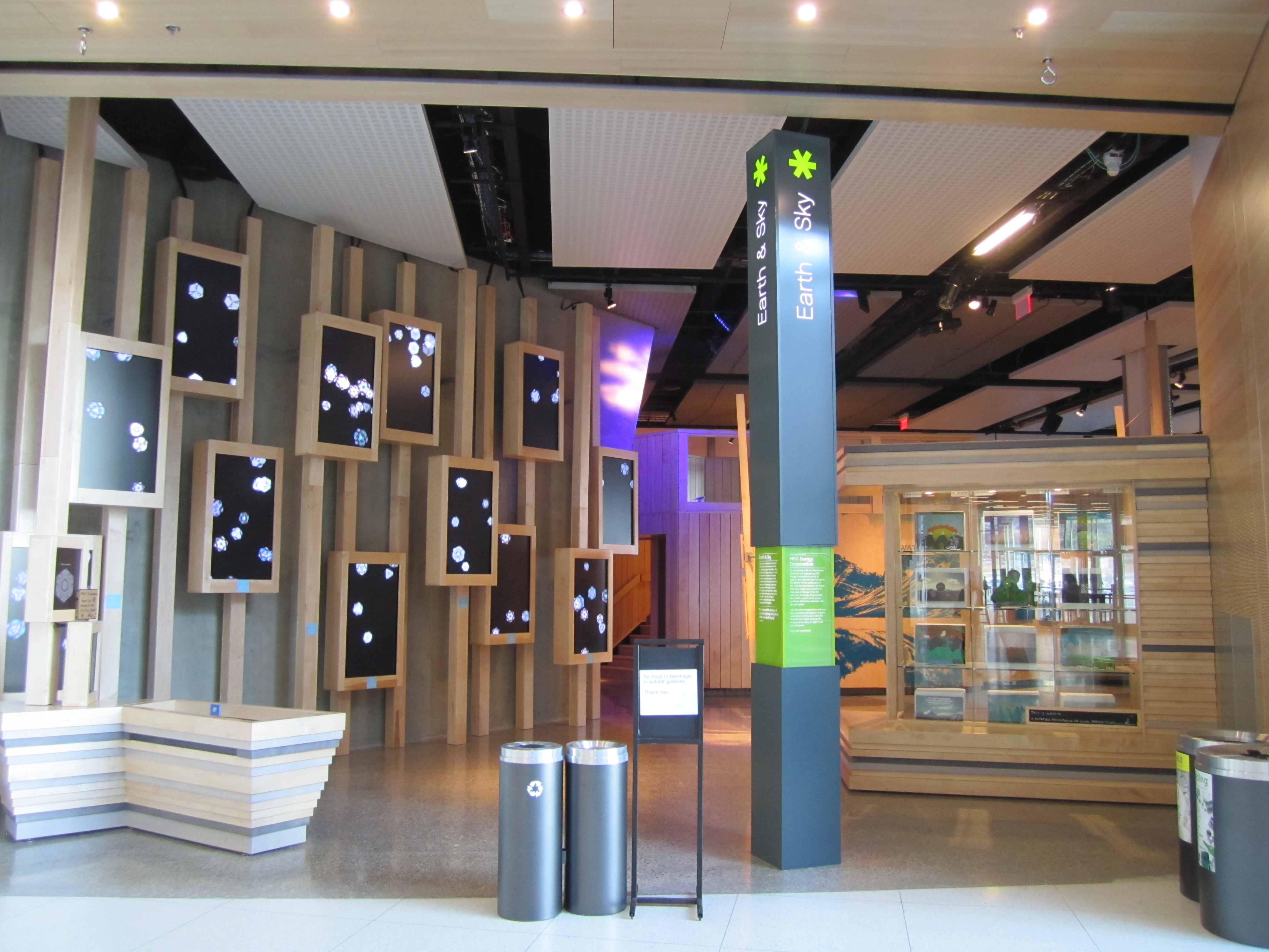 TELUS Spark